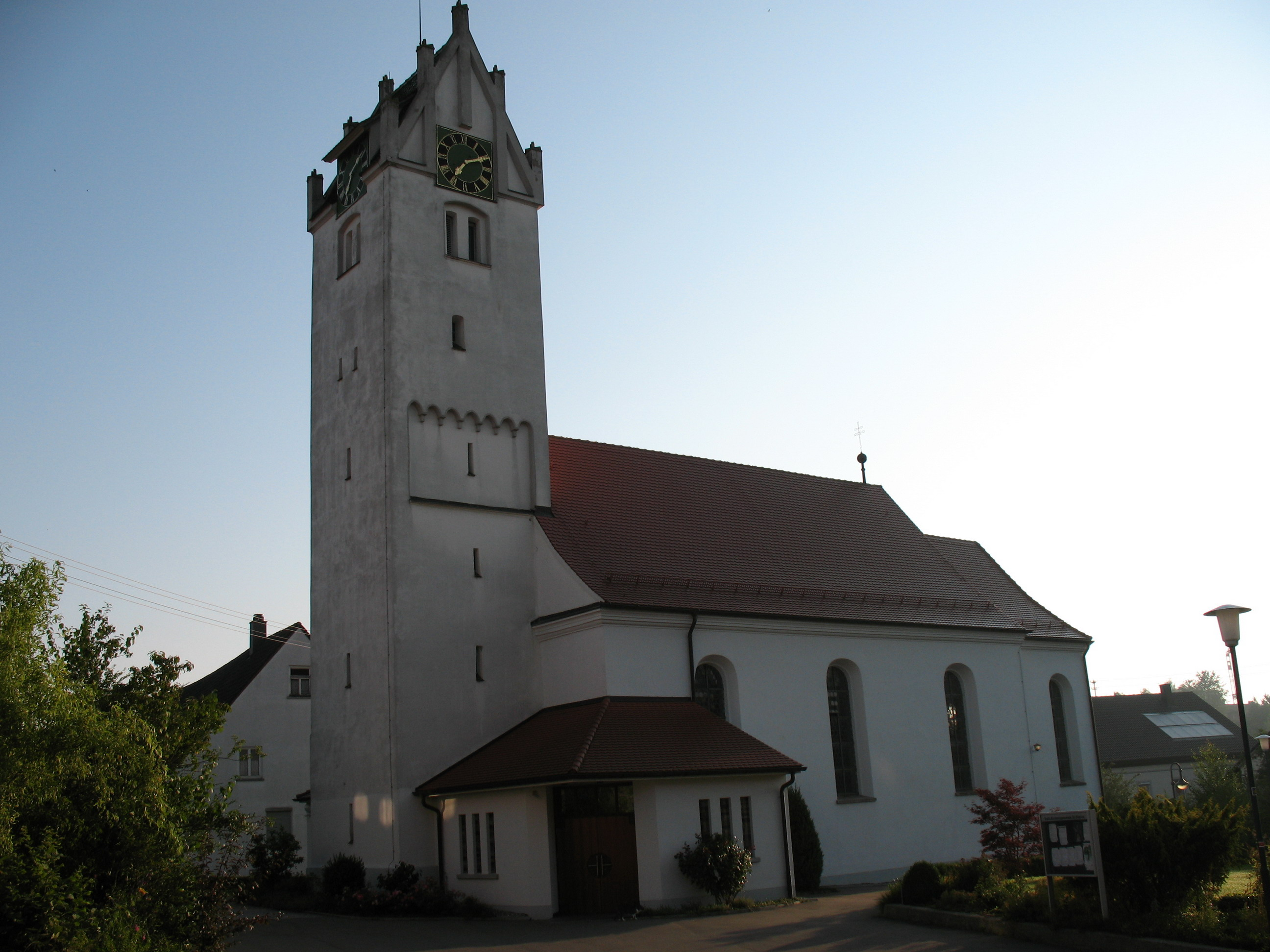 Die Kirche St. Blasius von Äpfingen in der Südansicht.